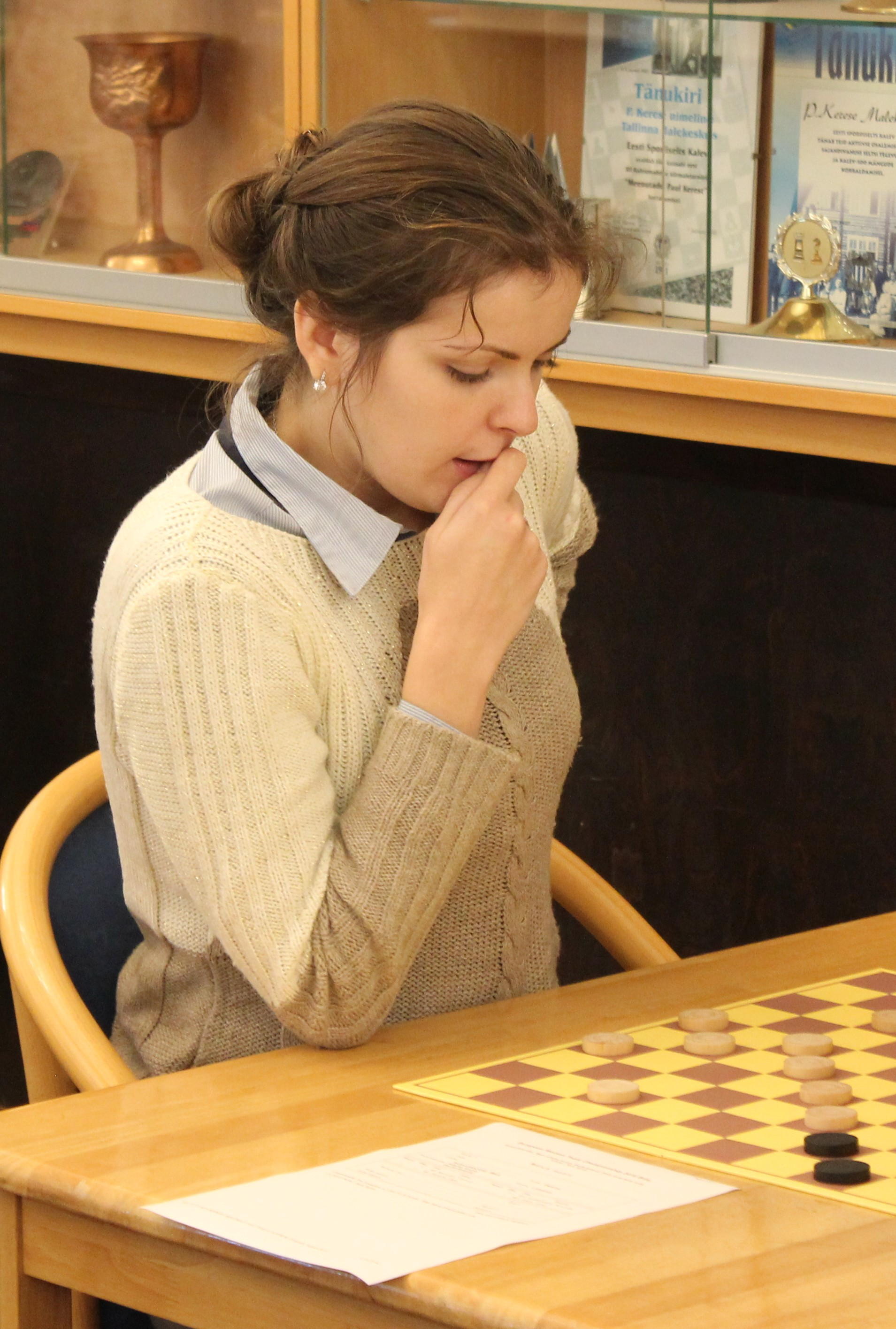 Viktoriya Motrichko Euroopa võistkondlikel meistrivõistlustel välkkabes